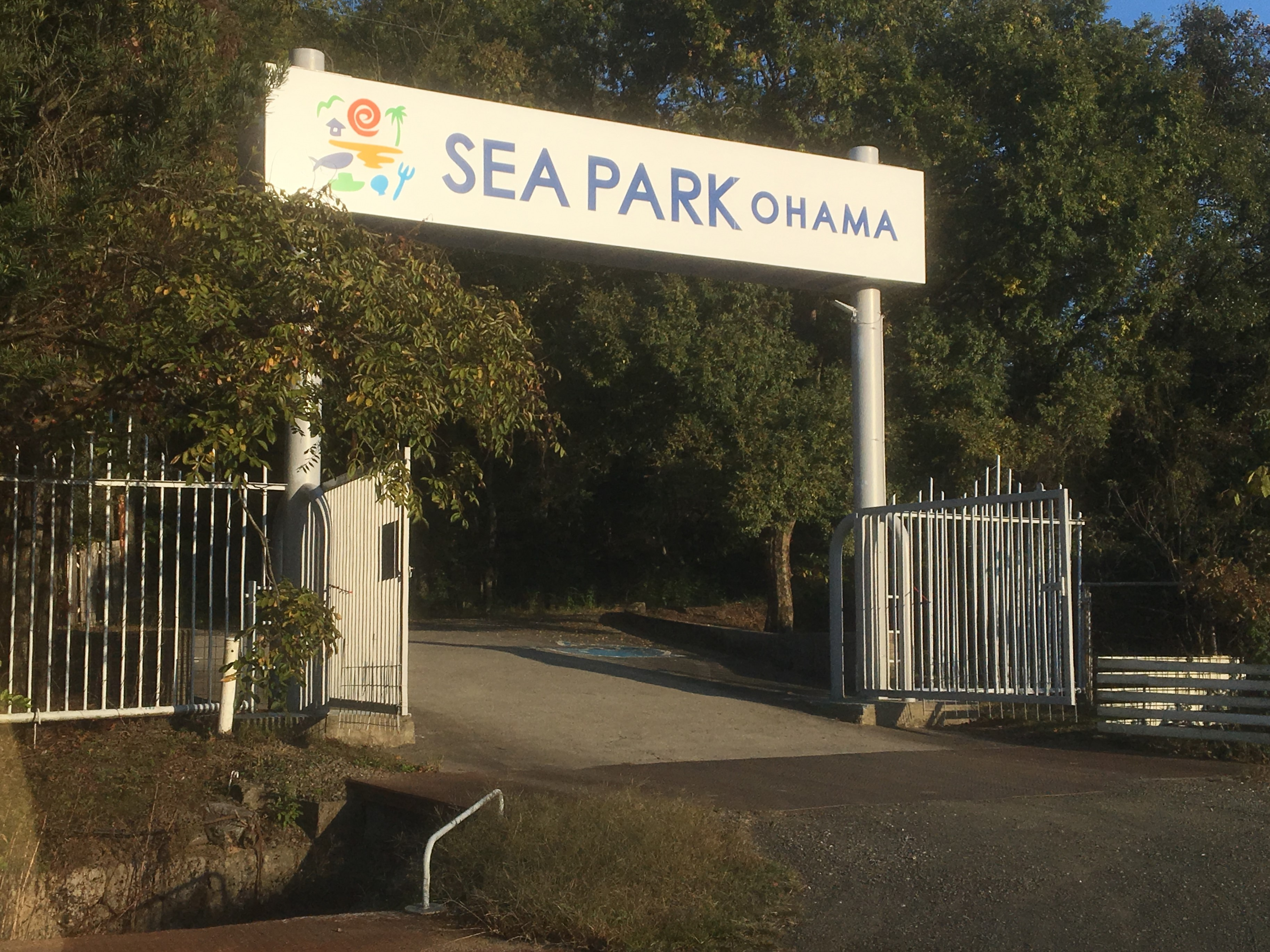 シーパーク大浜。広島県福山市横島の有料海水浴場の門。旧大日本帝国陸軍岩国陸軍燃料廠横島出張所跡。